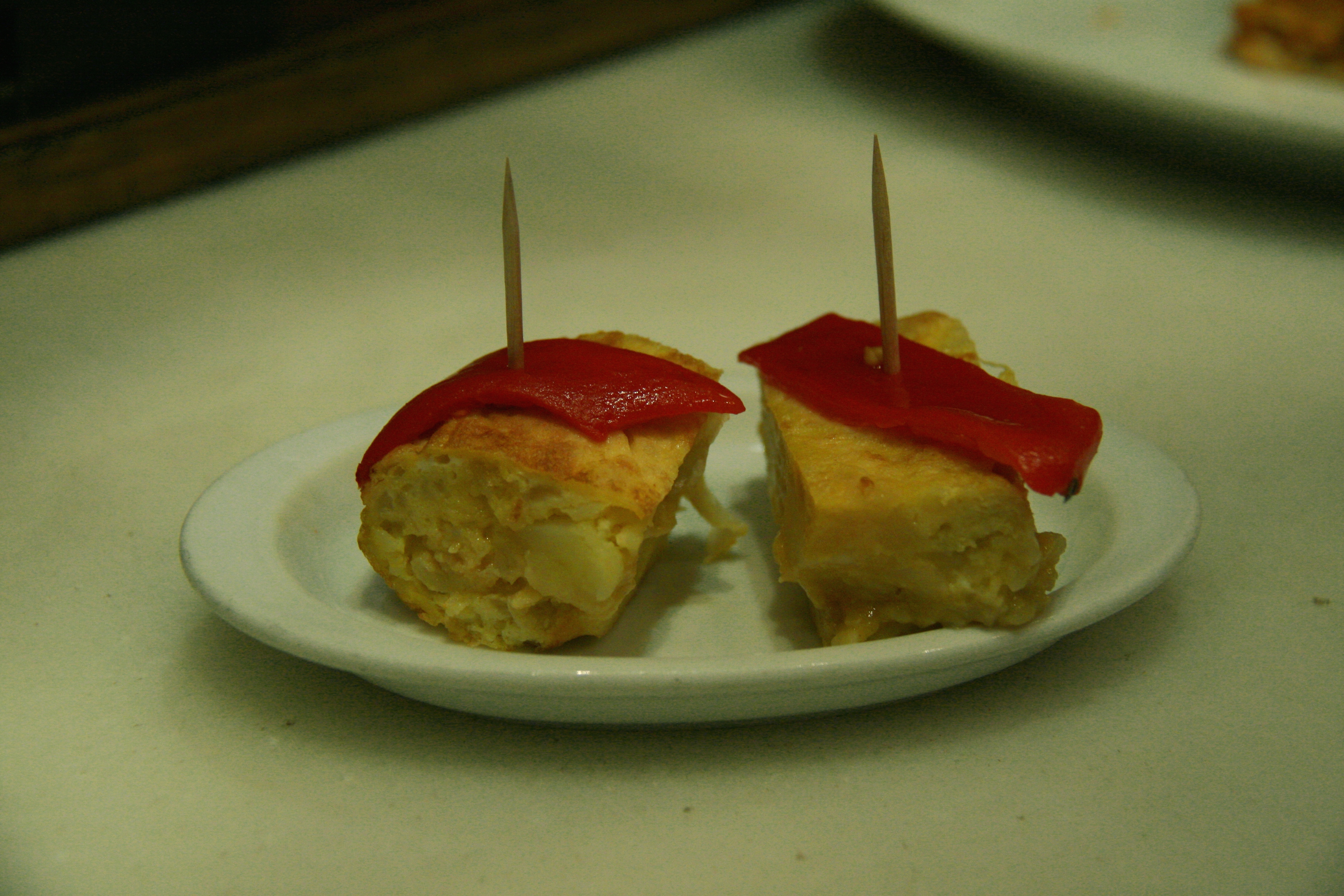 Dos pinchos de tortilla de patatas con pimiento